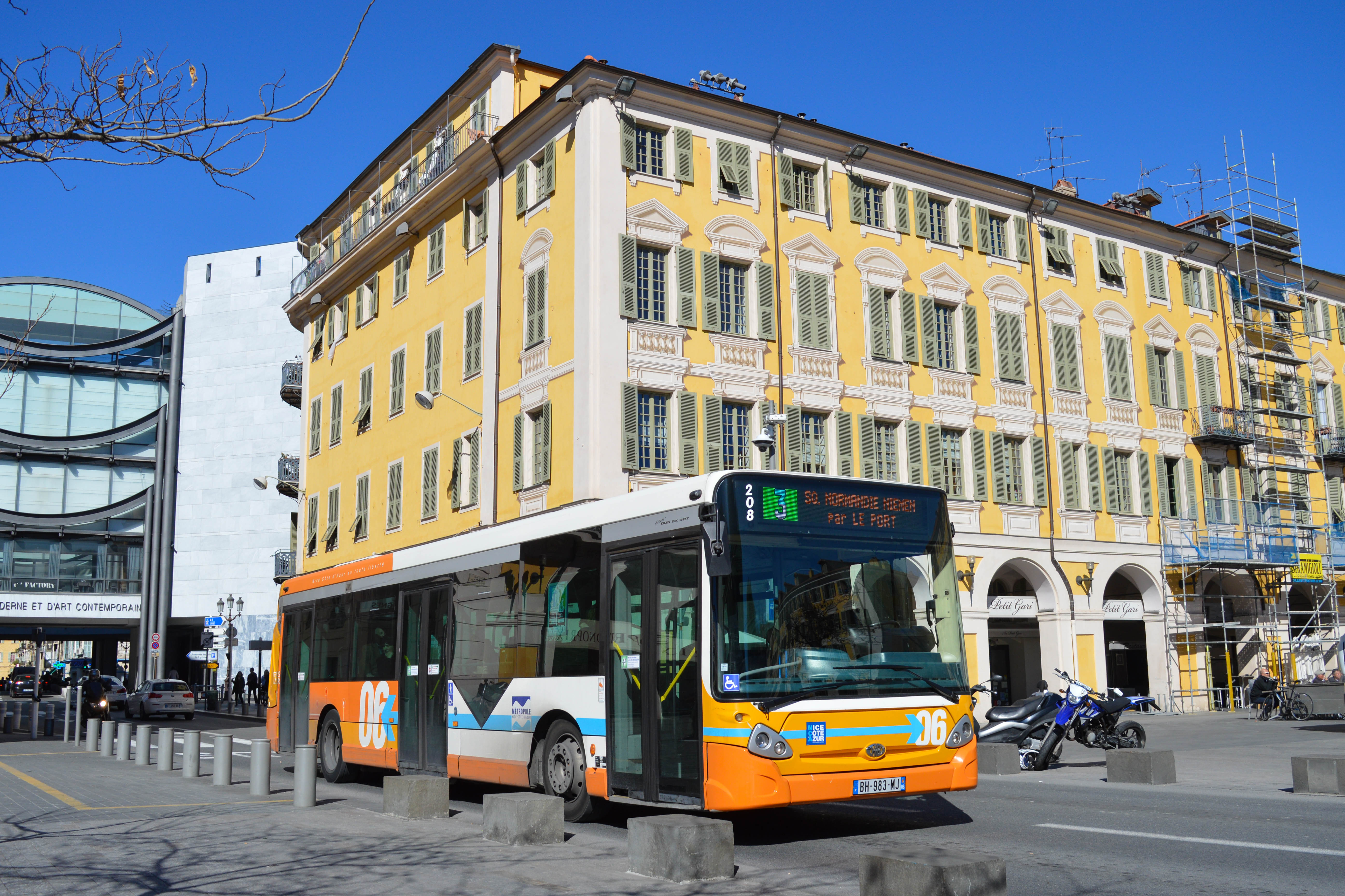 Heuliez GX327 RLA